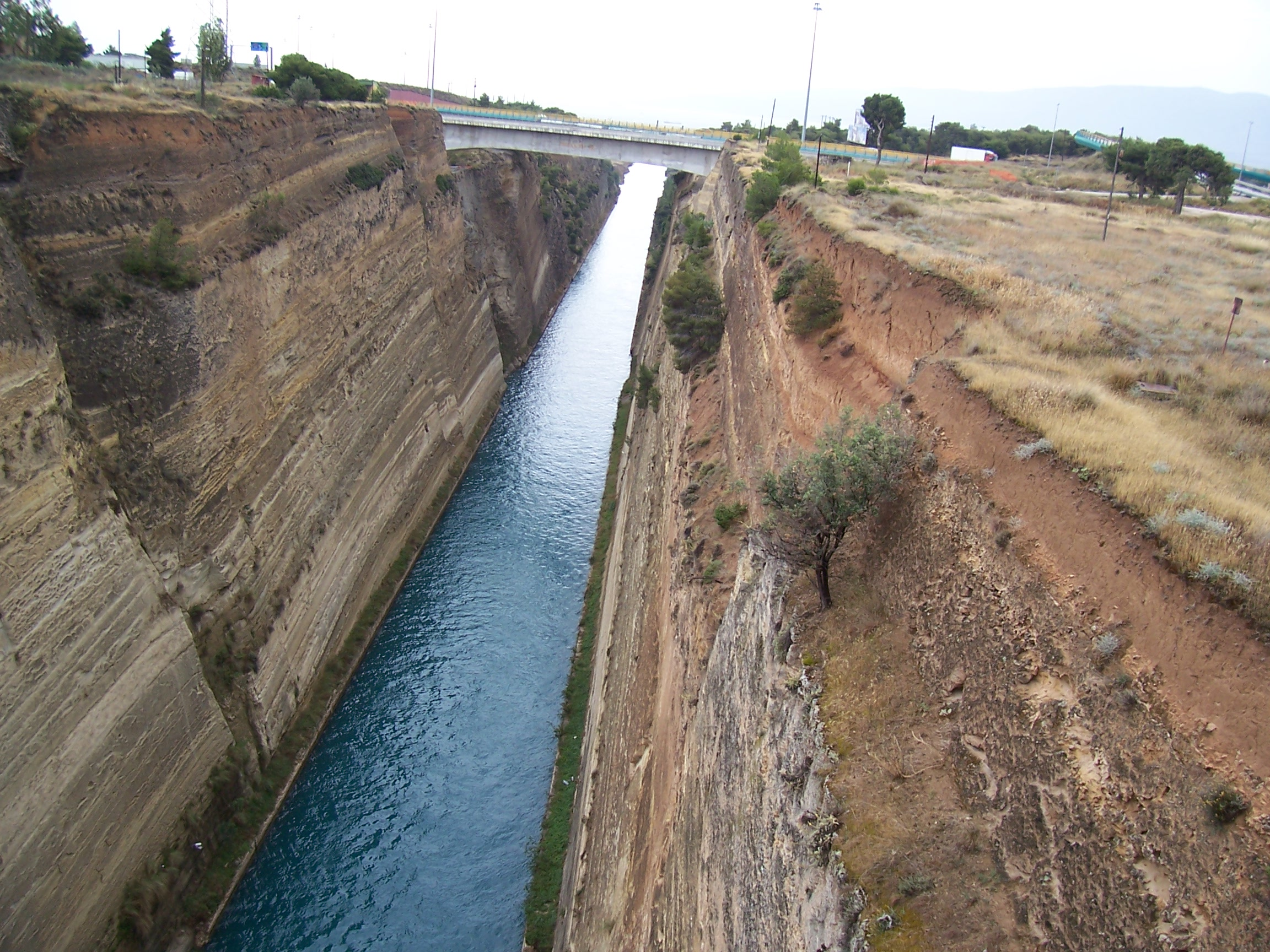 Corinth Canal — vue depuis le pont routier.